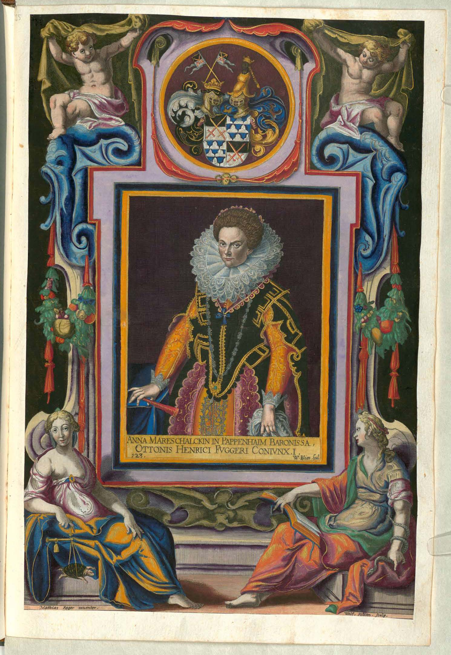 Fuggerorum et Fuggerarum imagines wurde 1588 von Philipp Eduard Fugger beim Kupferstecher Dominicus Custos in Auftrag gegeben. Das Werk enthält mit Aquarell- und Gouache-Farbe kolorierte Stiche der Mitglieder der Fugger von der Lilie. Der Druck von 1618 stellt das einzige kolorierte Exemplar dar. Anna Marschallin von Pappenheim (?-1616), Ehefrau des Otto Heinrich (Ottheinrich) Graf Fugger (1592-1644) (Abbildung Blatt 124r fehlt), des Sohns des Christoph Freiherr Fugger (1566-1615)